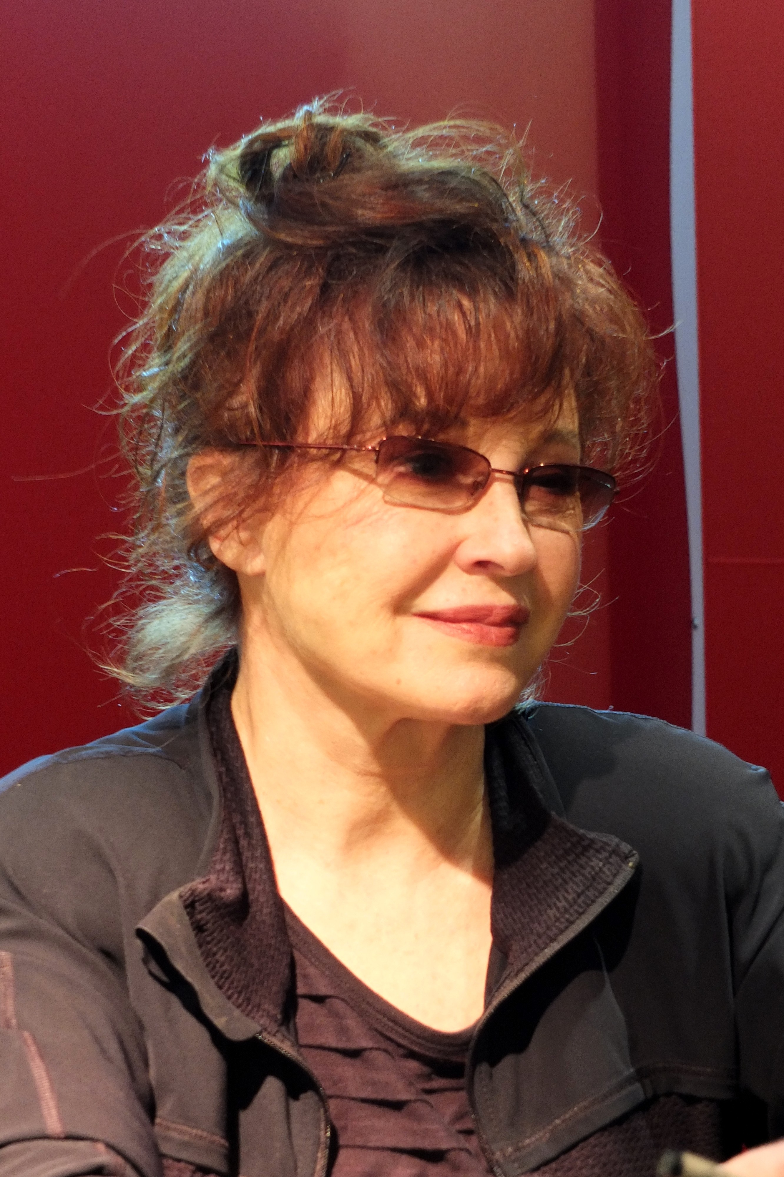 Marlène Jobert lors de la présentation de son livre Les bisous du croqu'Odile à la FNAC des Ternes, Paris (17e arrond.).